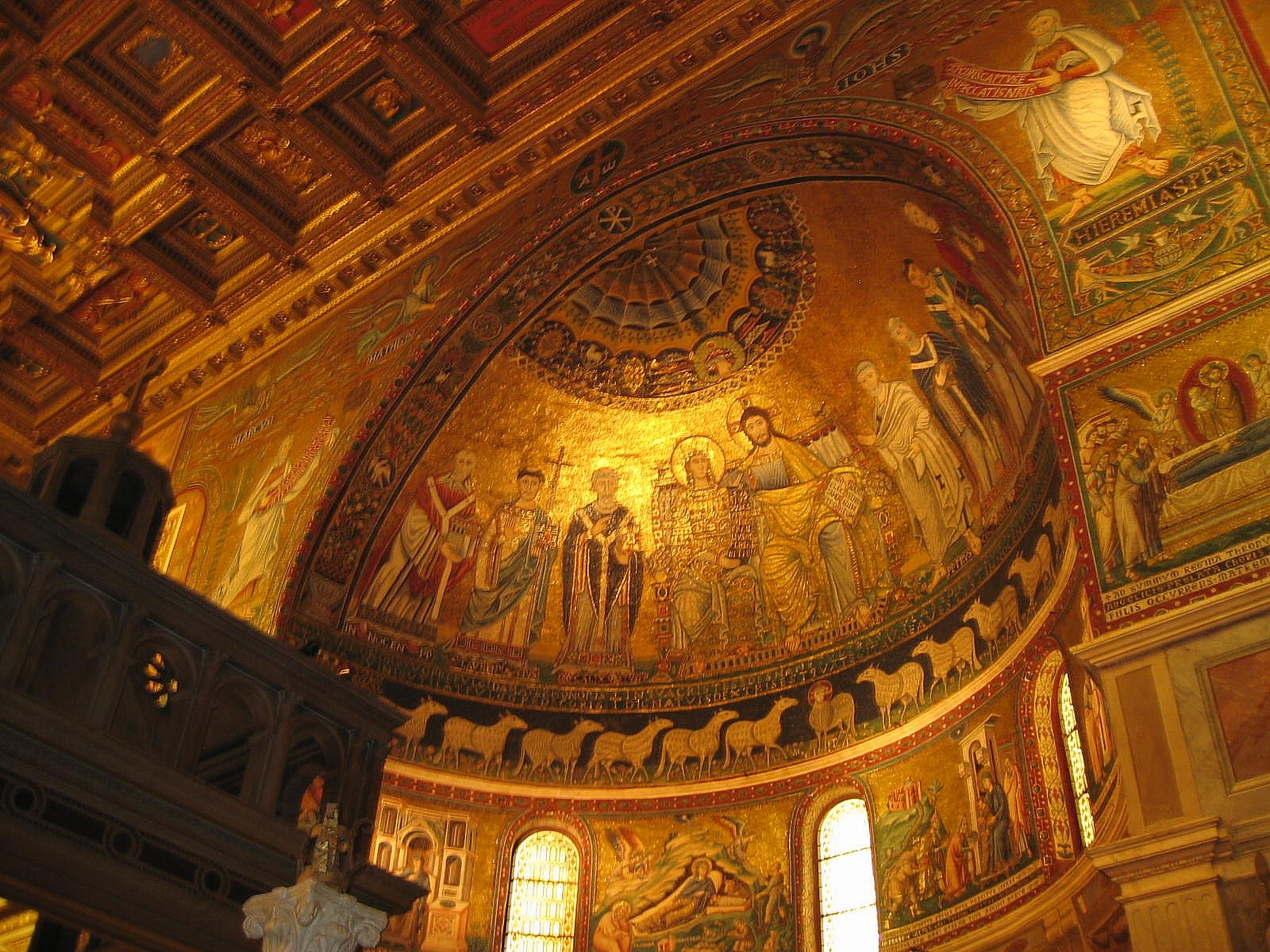 Santa Maria in Trastevere, Rom - Absidmosaiken. Fotografi av Lamré, 2004-06-13.